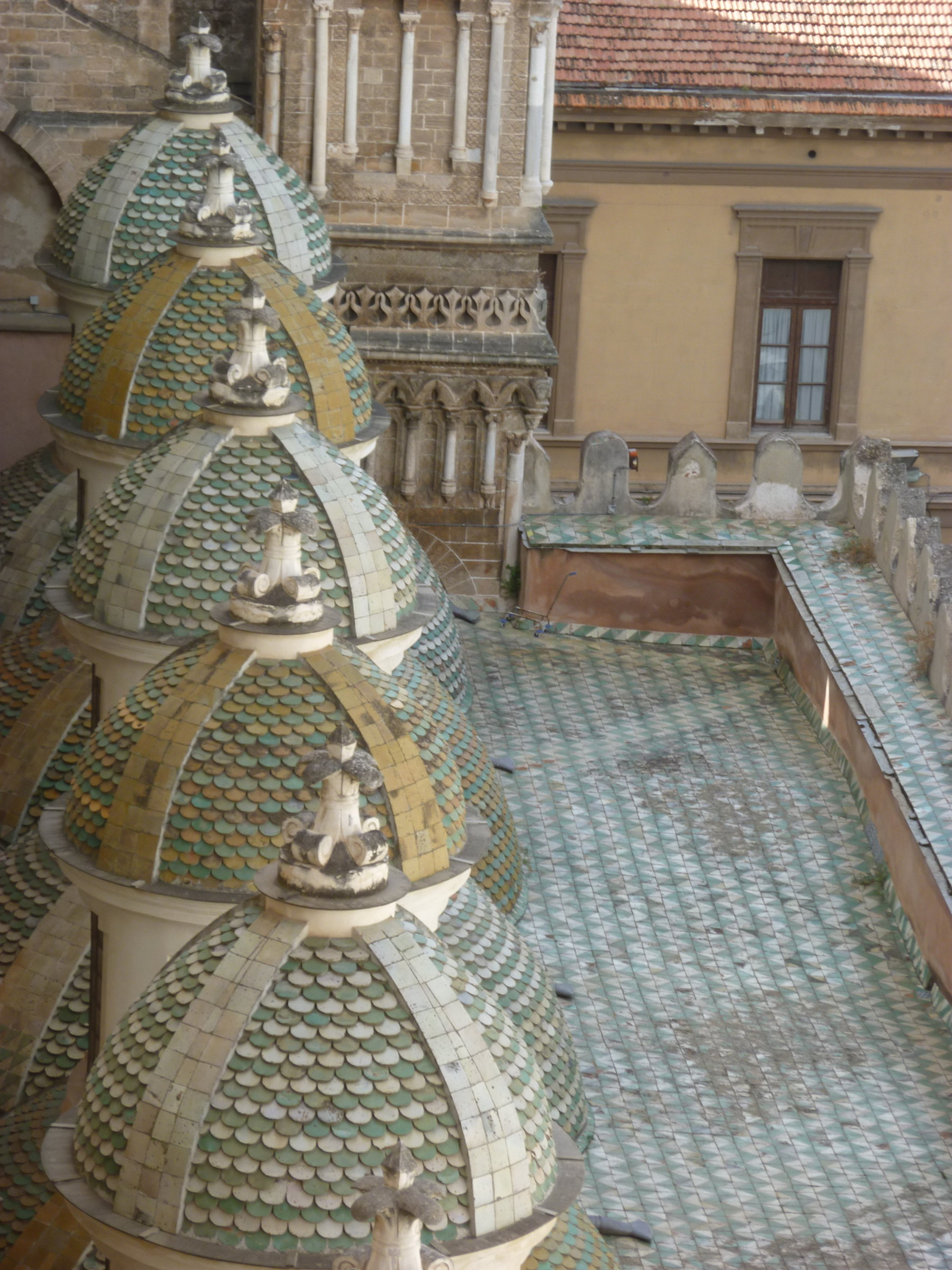 Palermo